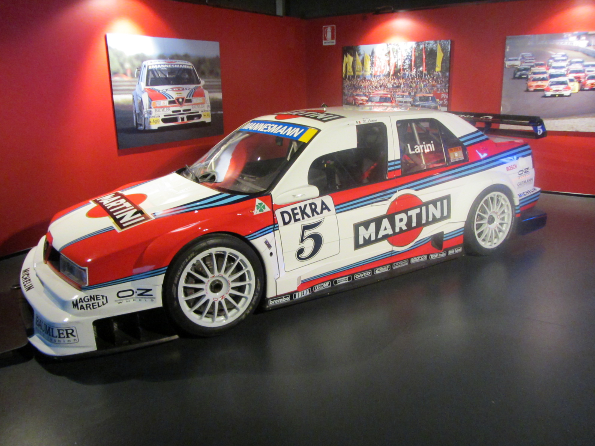 Alfa Romeo 155 V6 TI dominatrice del DTM fin dal suo debutto conservata al Museo dell'Automobile di Torino